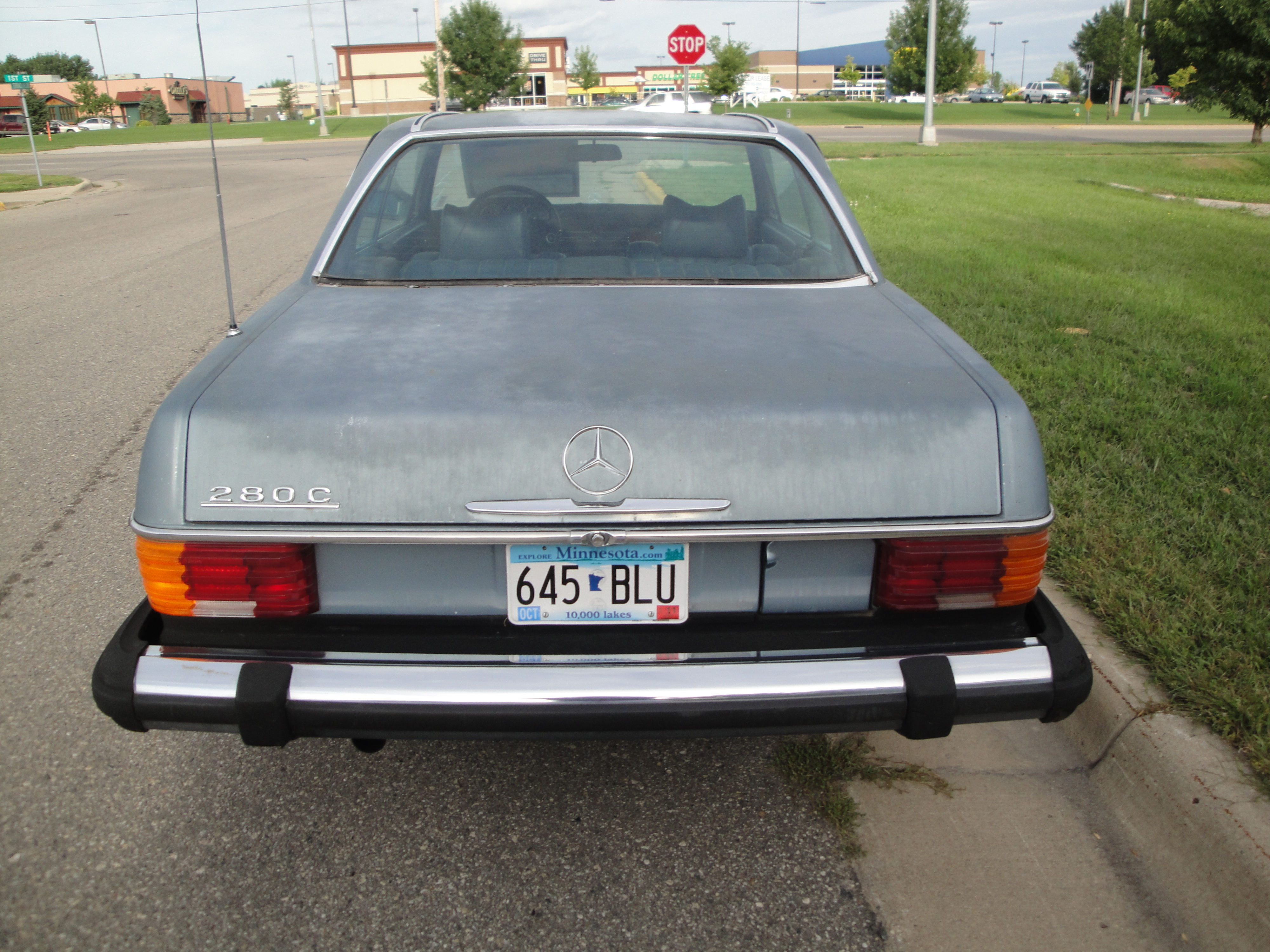 76 Mercedes 280C